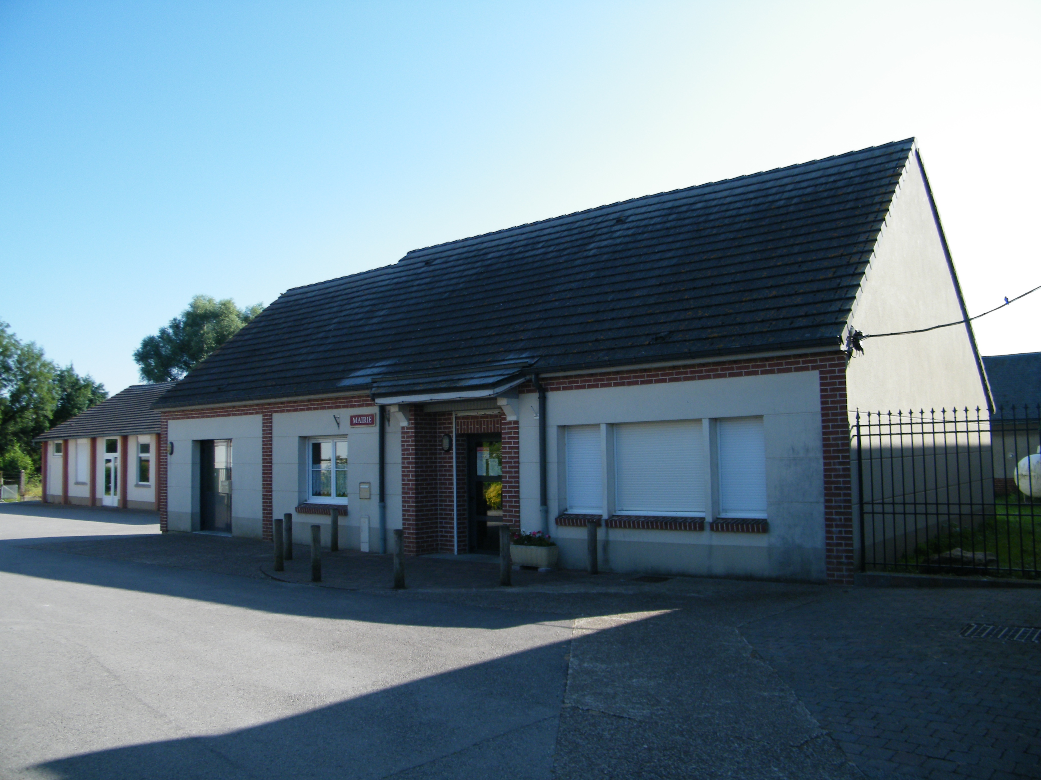 Mairie.